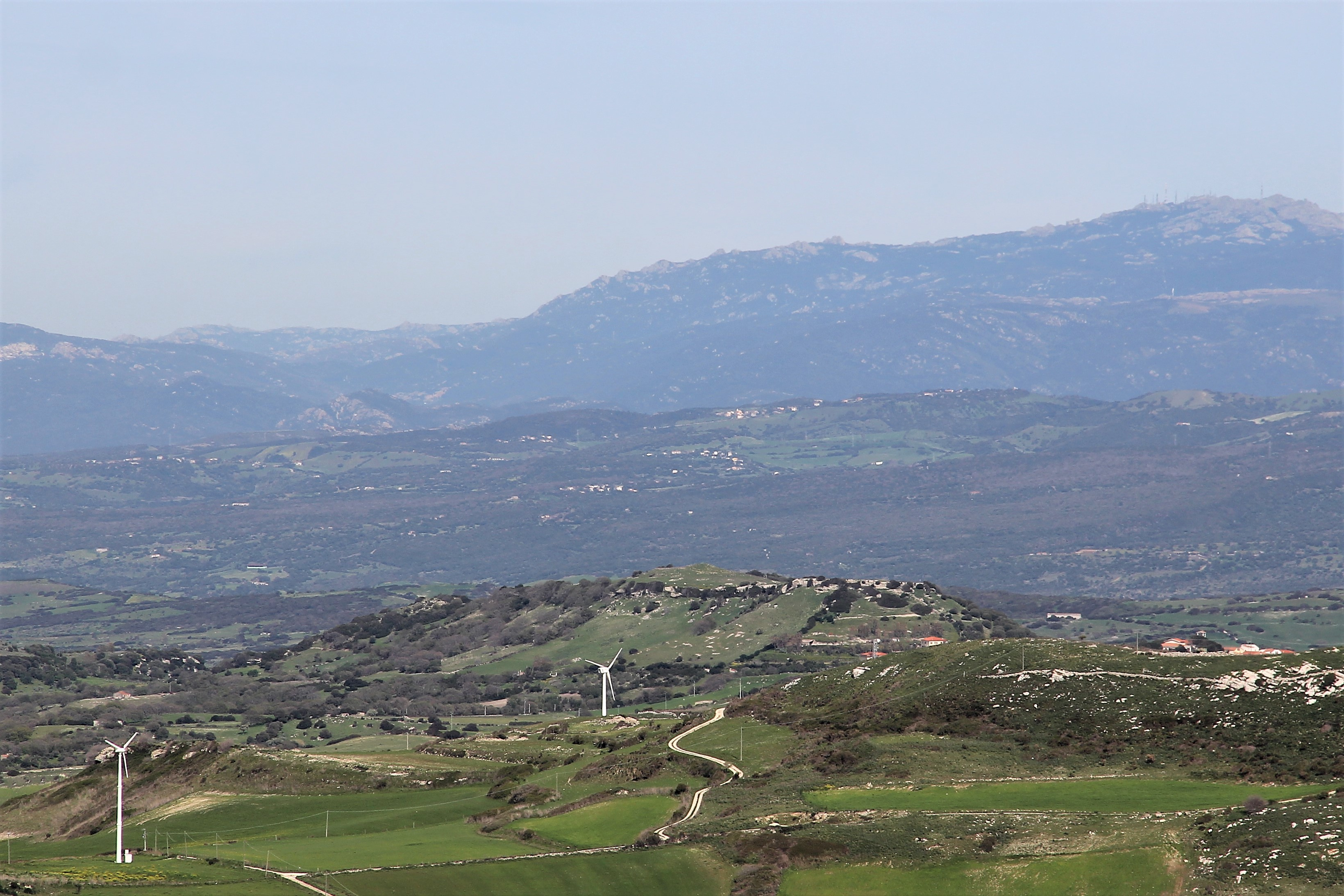 frazioni Mudditonalza, Campudulimu e Falzittu